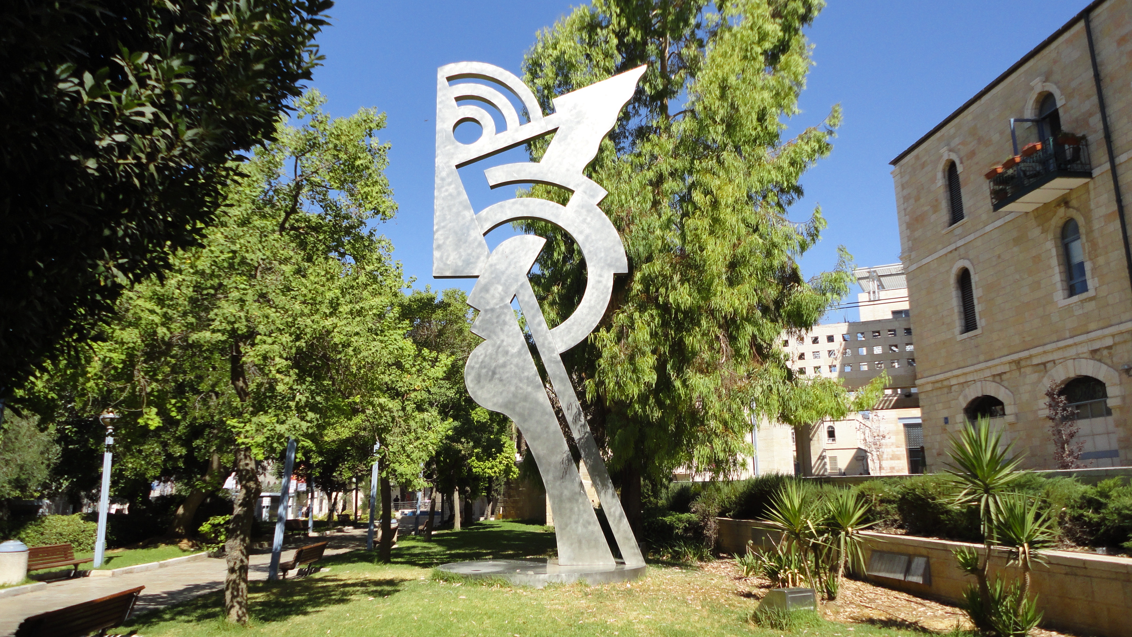 Sculpture